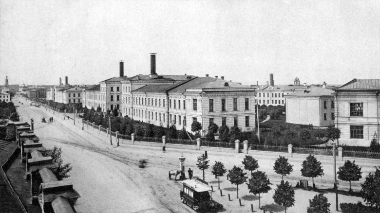 Клинический городок на Девичьем поле вид с Царицинской улицы (Большой Пироговской)